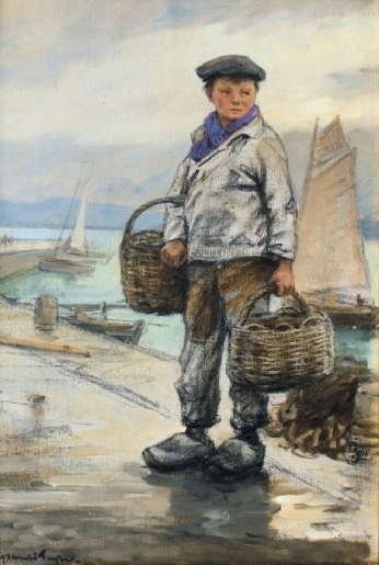 Achille Granchi-Taylor : Jeune pêcheur au panier (huile sur toile, 35 x 24 cm)